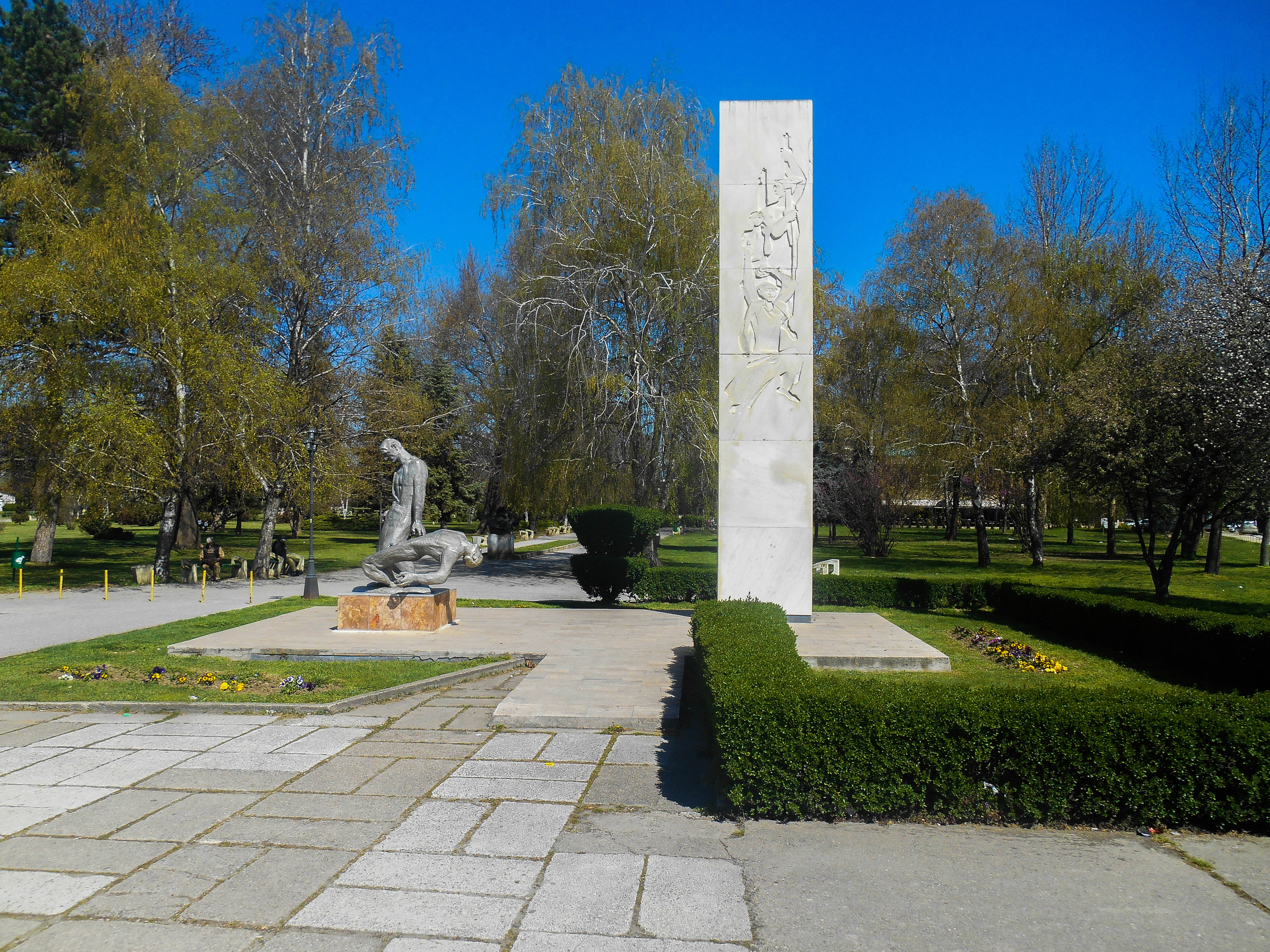 Споменик на револуцијата